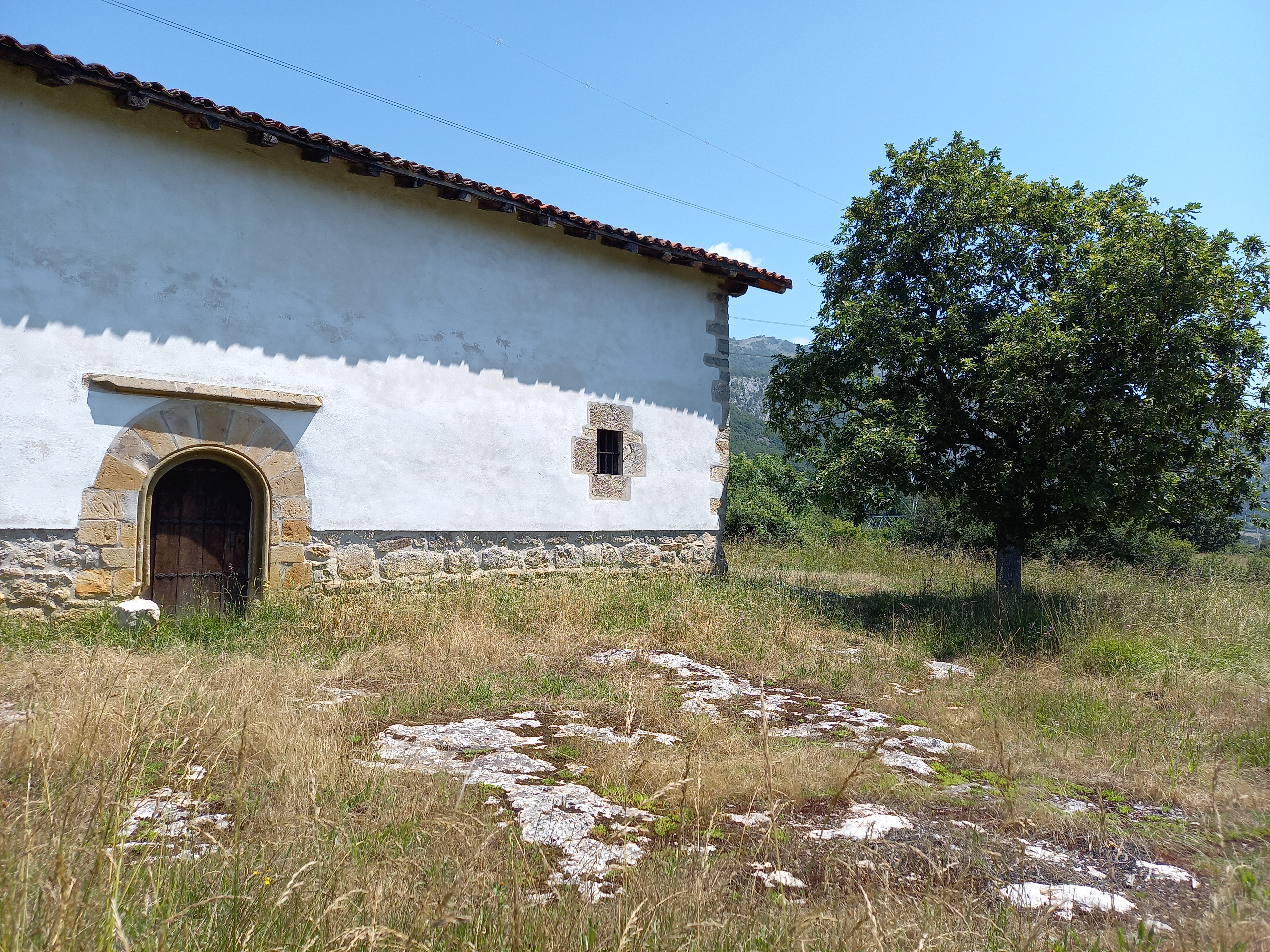 Lakuntzatik Arruazura bidean dagoen ermita